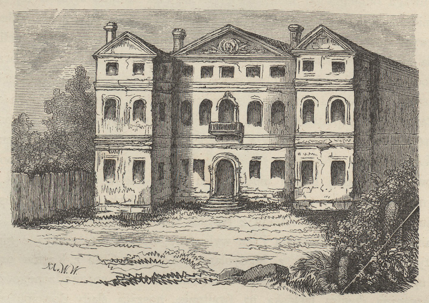 Беларуская (тарашкевіца): Вільня (Vilnia), Антокаль (Antokal). Палац Слушкаў